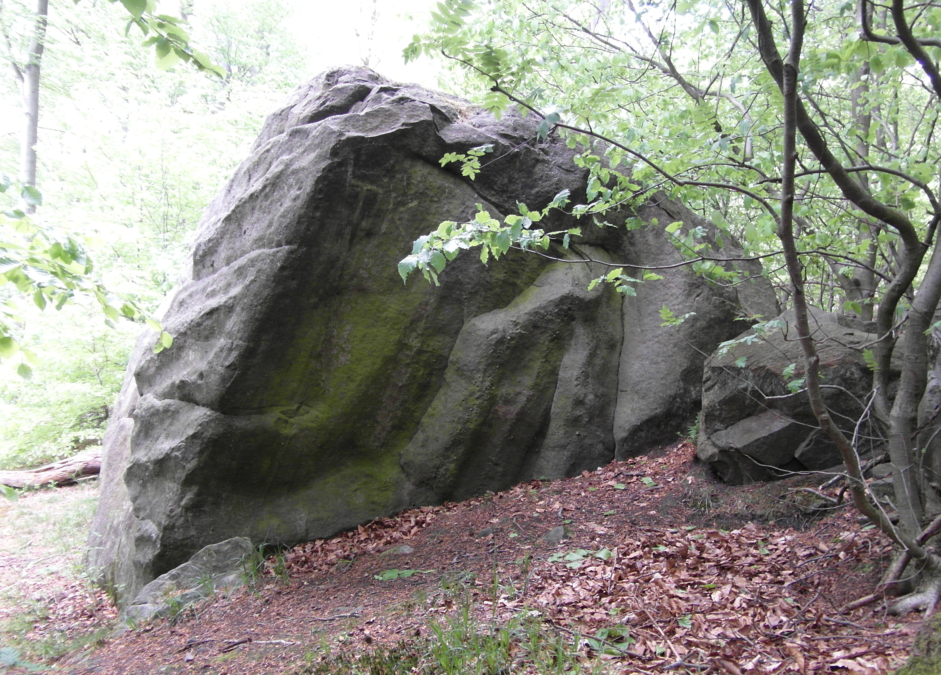 Naturdenkmal ND-HM 174 Teufelskanzel im Deister. Bei Nienstedt, Stadt Bad Münder, Landkreis Hameln. Südostansicht.